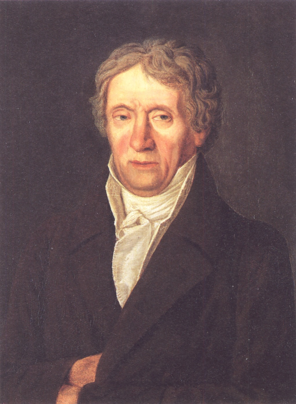 Mathias Metternich (1747–1825) um 1820 gemalt. Ölgemälde, wahrscheinlich von Johann Kaspar Schneider, undatiert und unsigniert, Mainz, Privatbesitz